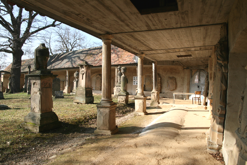 Campo-Santo-Anlage in Buttstädt/Thüringen (LK Sömmerda)